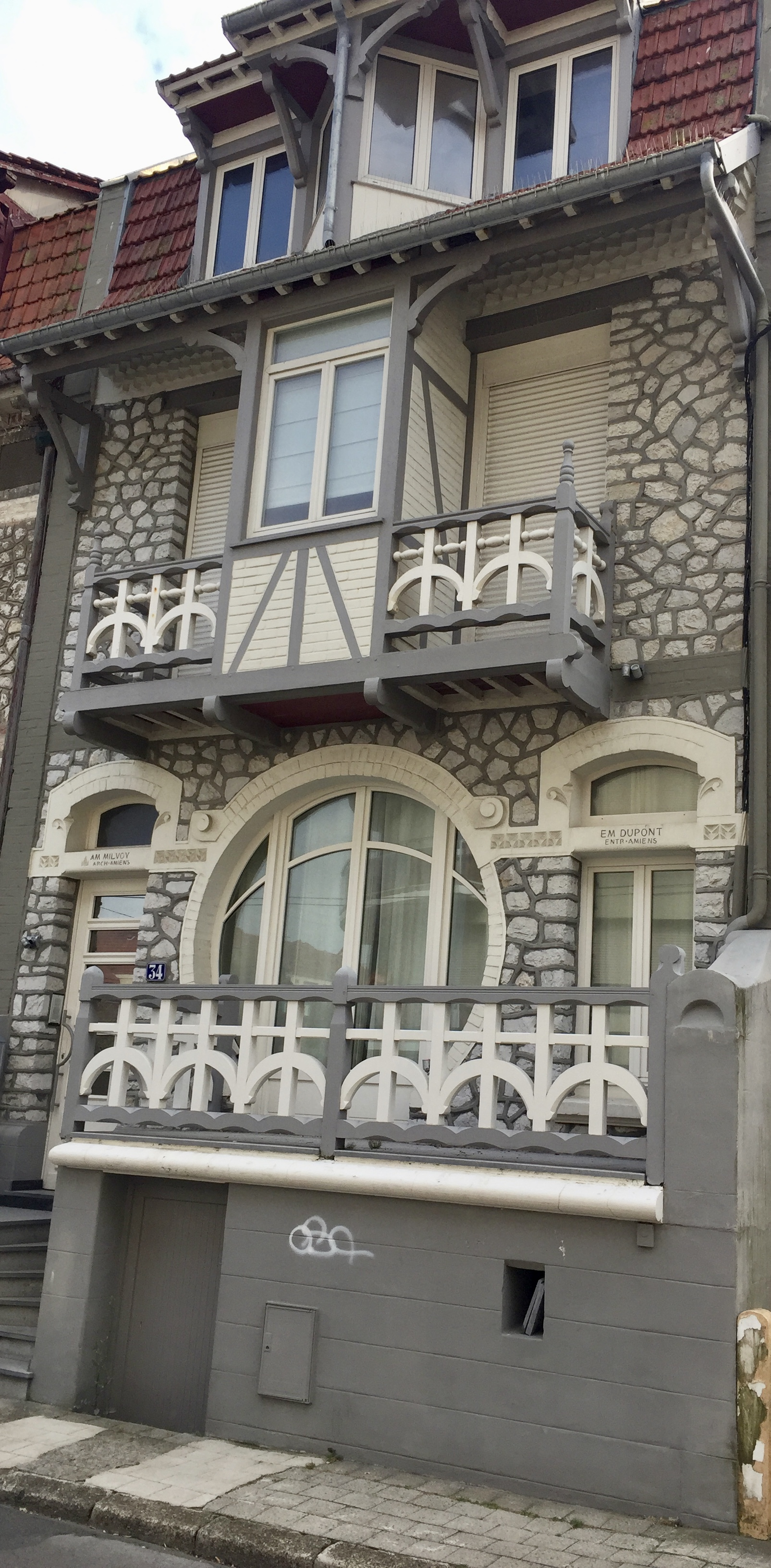 Villa Milvoy-Dupont au 34 rue Joseph Duboc à Le Touquet-Paris-Plage